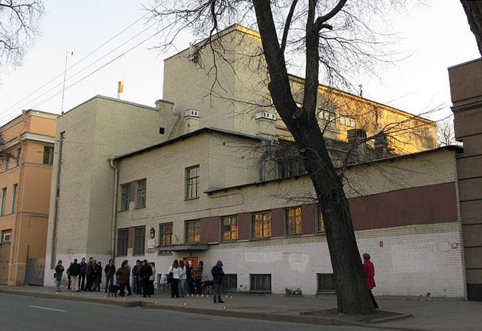 Тяговая подстанция № 11 на Фонтанка, 3а, давшая электроэнергию 15 апреля 1942 года в блокадном Ленинграде